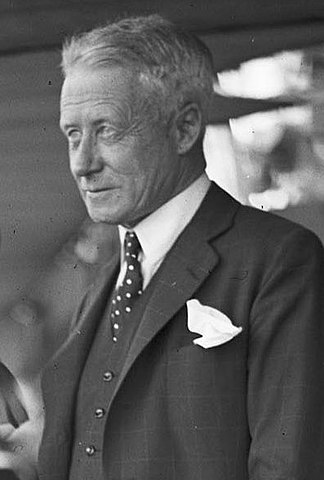 Charles Lloyd Jones on board HNLMS Java in Sydney, October 1930.